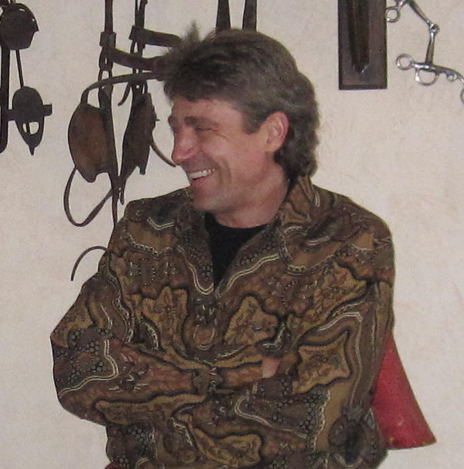 Я сфотографировал Олега когда был у него в гостях.